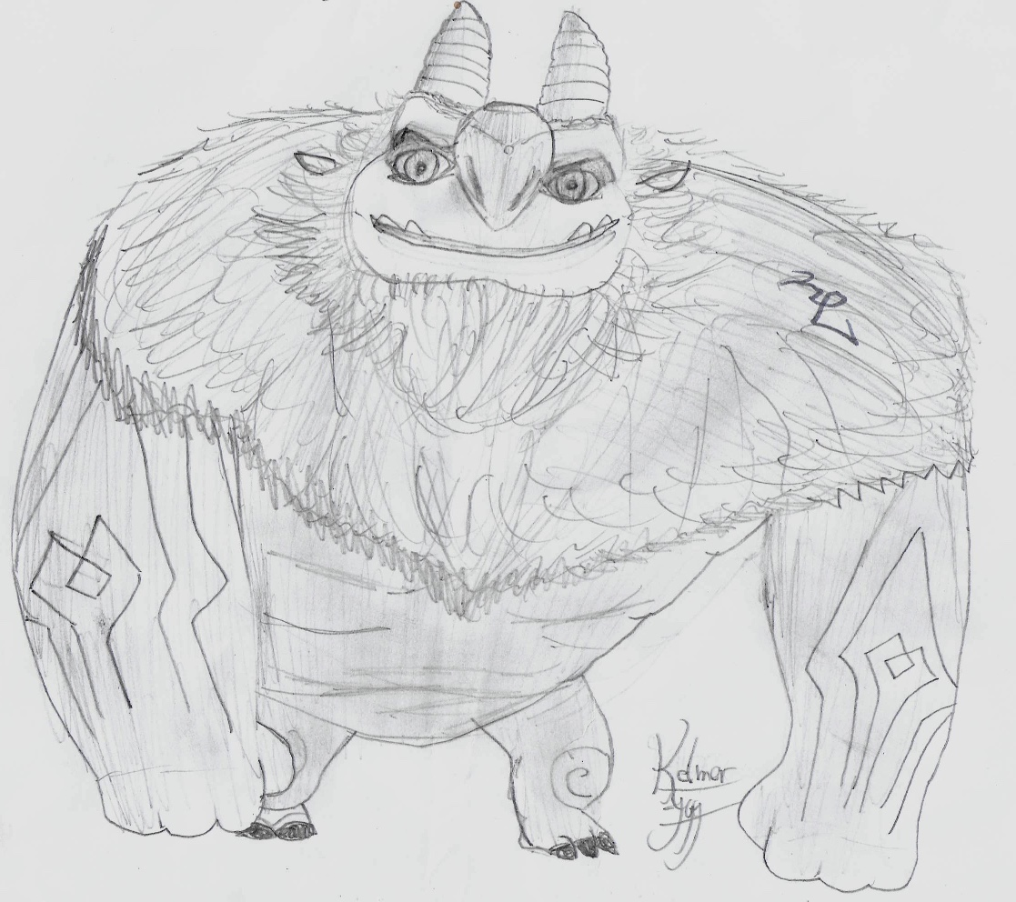 Argh!omon, un des principaux personnages de la série Chasseurs de Trolls, ami de Blinkhouse Galadrigal, de Jimmy Dulac Jr. et de Toby.